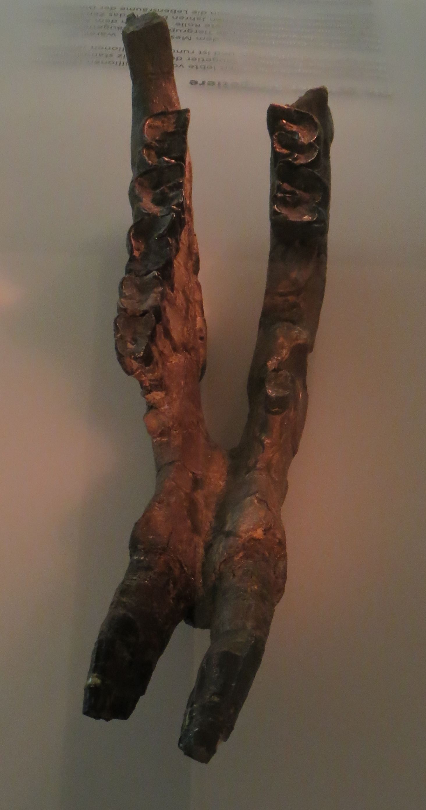 Fossil of Ronzotherium- Took the picture at Natural History Museum, Basel